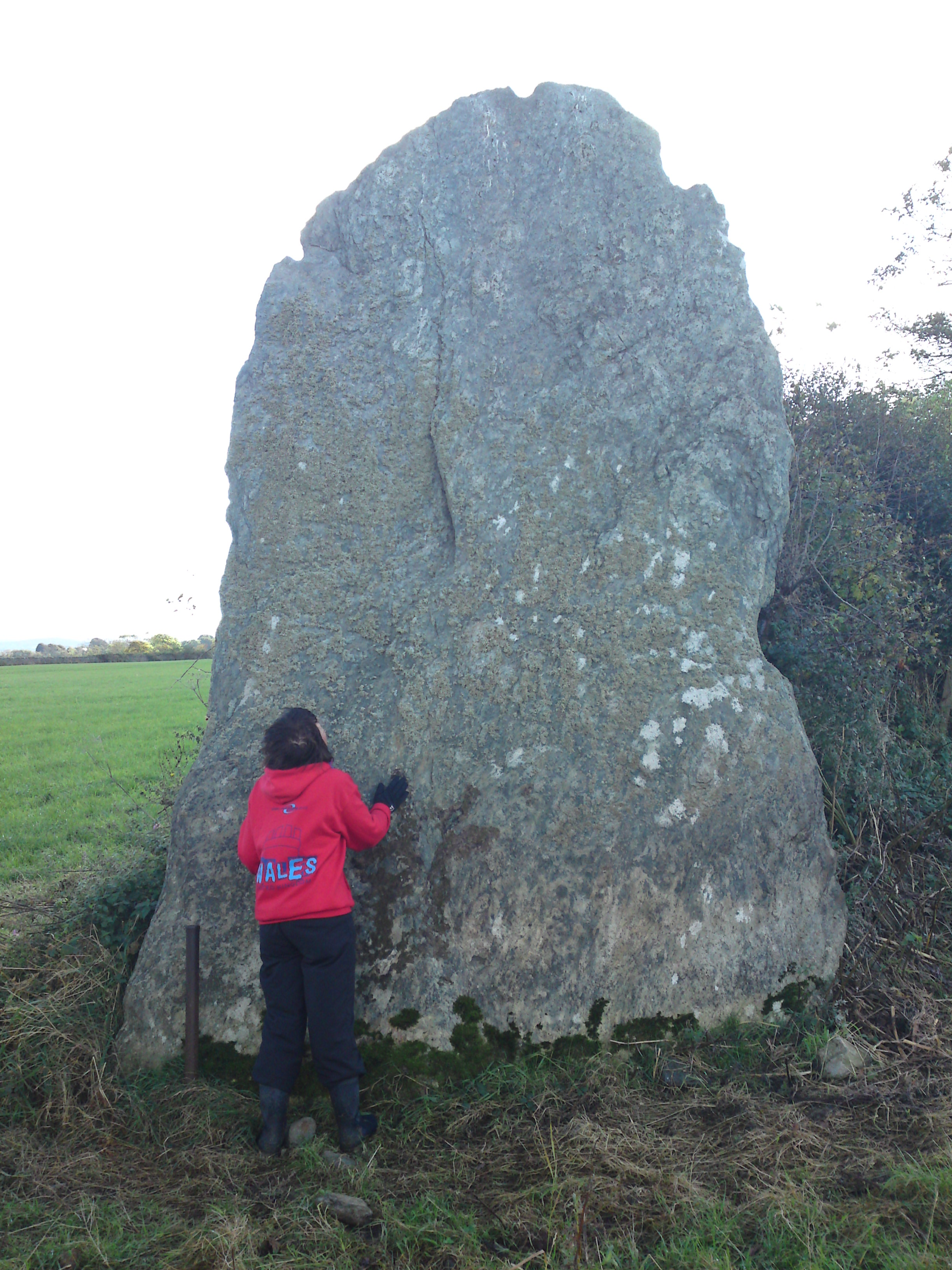 Bryn Gwyn slab stone with small adult